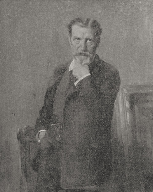 Hermann Carl Hempel (1907), Direktor der Kunsthalle (feierte zu seinem 25. Jubiläum am 1. Oktober 1908), Reproduktion des Porträts von Wilhelm Schneider-Didam ausgestellt auf der grossen Ausstellung Düsseldorf in 1907, veröffentlicht in Rhein und Düssel vom 4. Oktober 1908